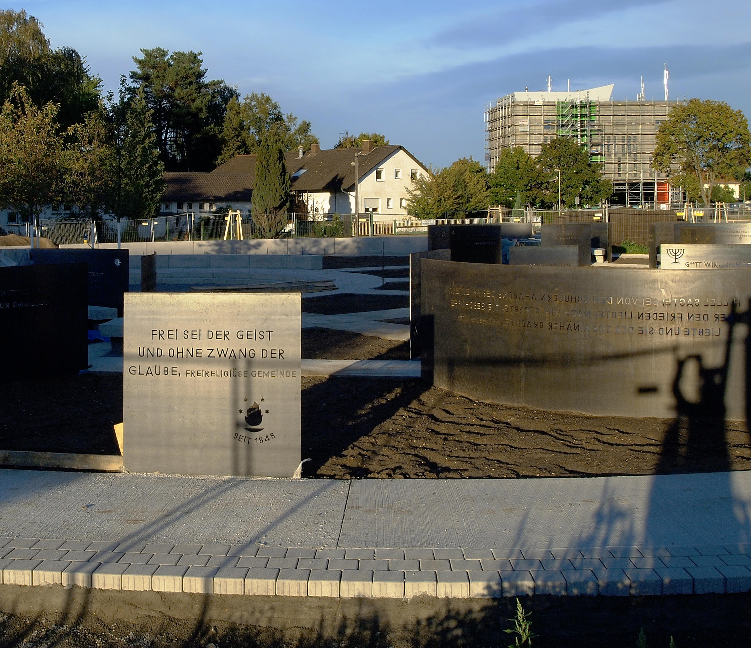 „Frei sei der Geist und ohne Zwang der Glaube“, Beitrag der Freireligiösen zum Garten der Religionen in Karlsruhe